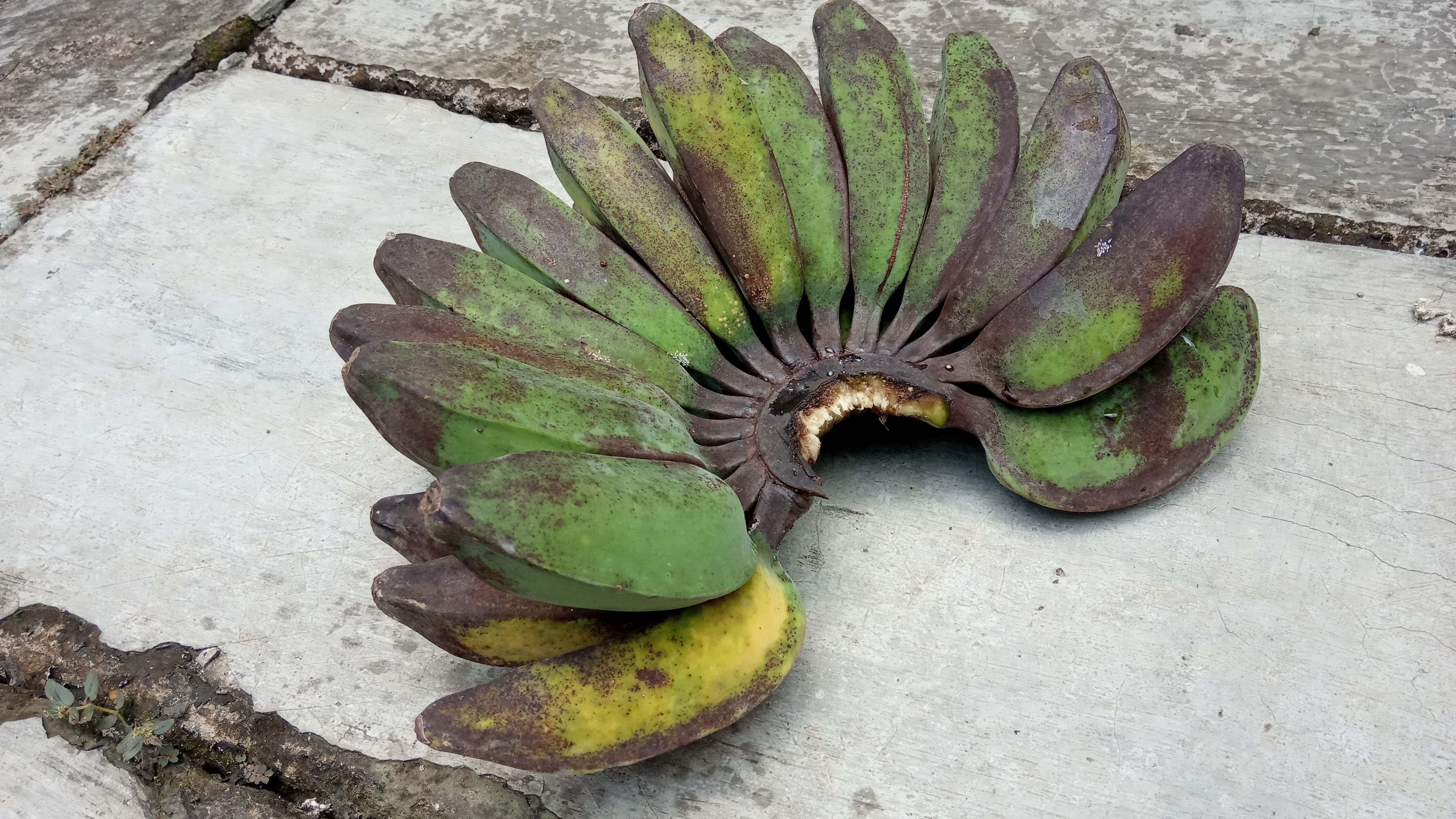 Buah Pisang Kepok yang sudah dipanen